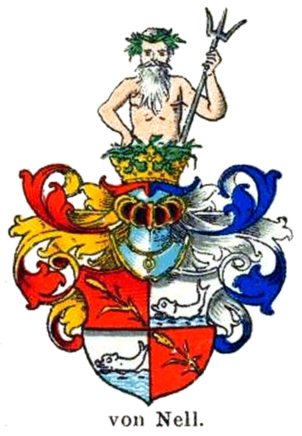 Wappen derer von Nell